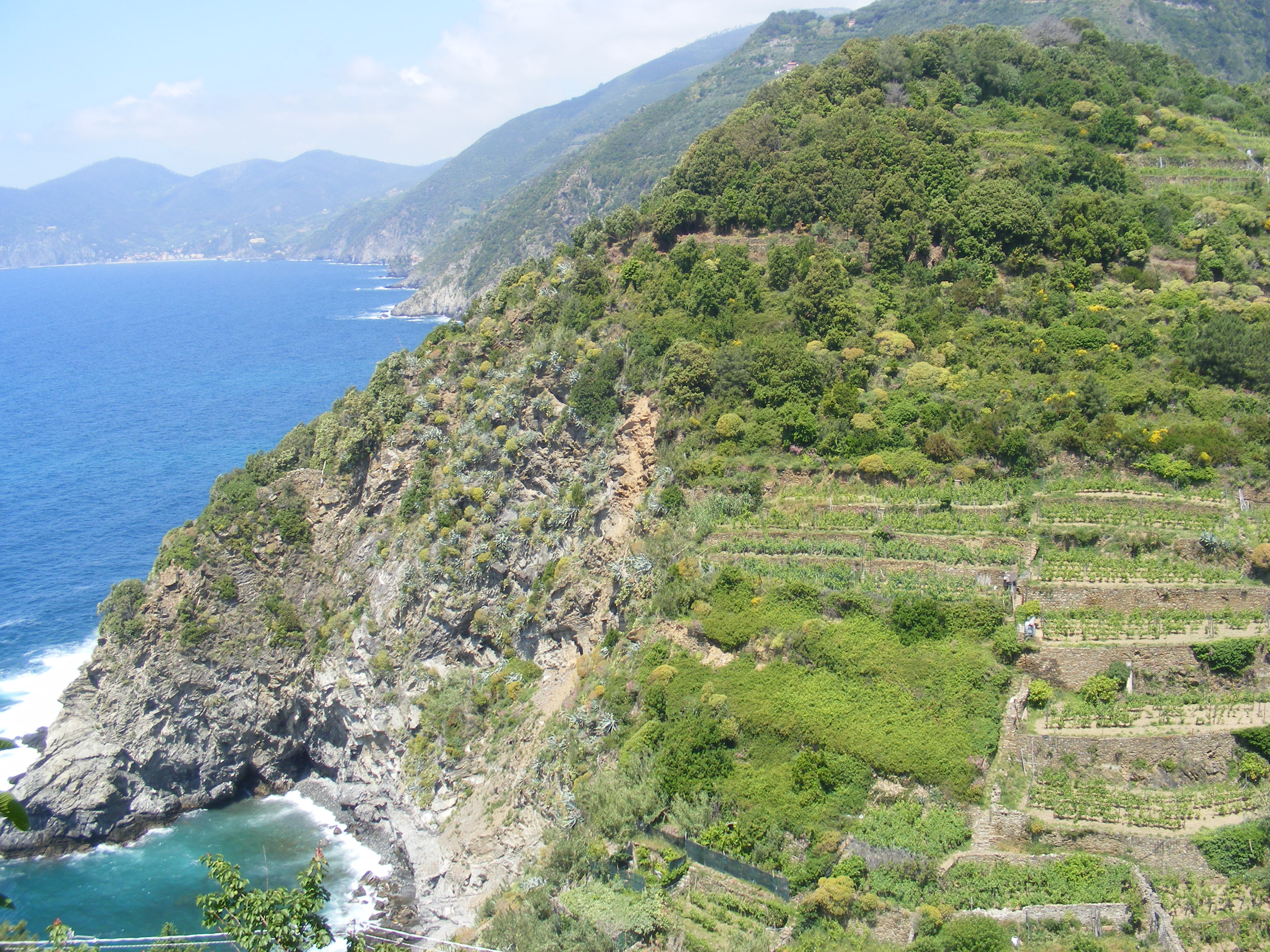 Terrasses de vignes sur falaise grèseuse